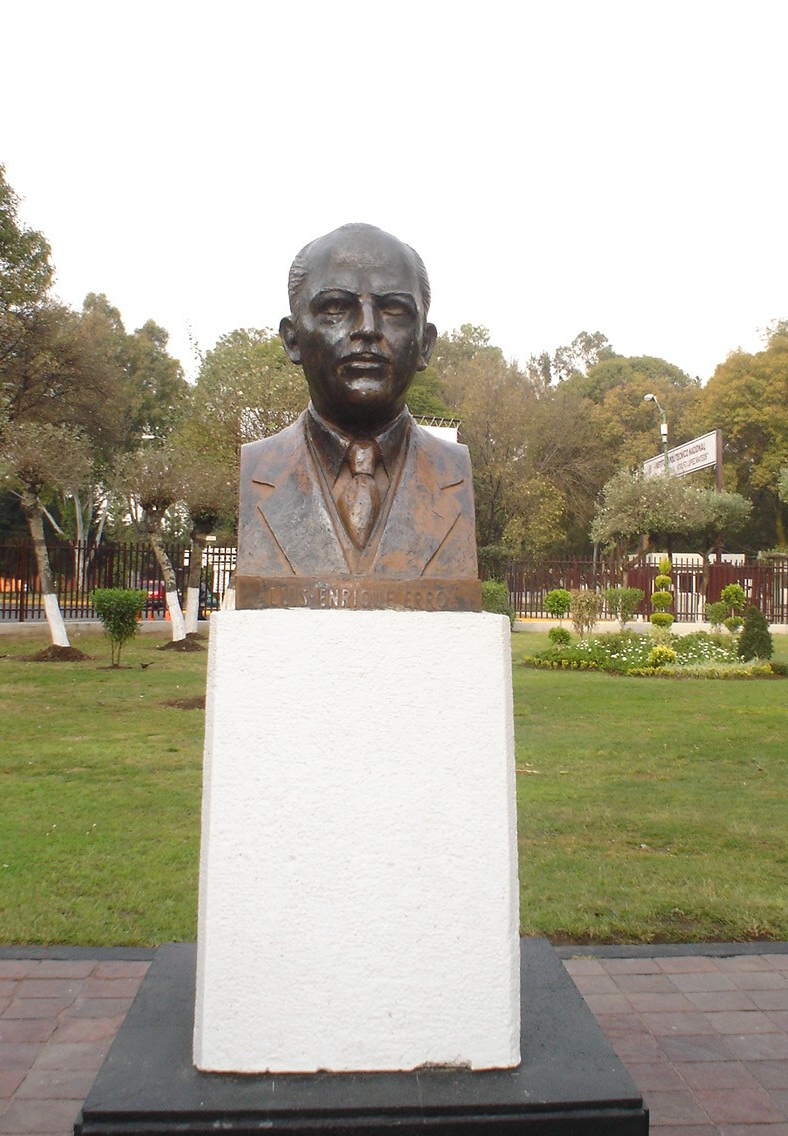 BUSTO DE LIC. LUIS ENRIQUE ERRO SOLER